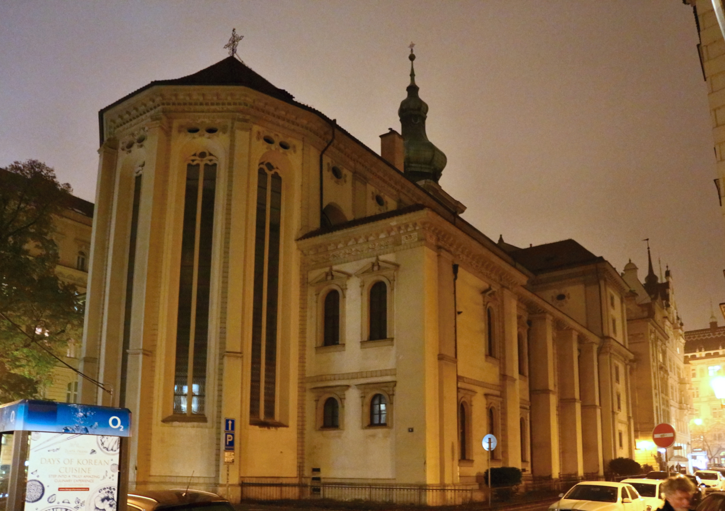 Kostel svatého Salvátora (Salvátorská ulice)